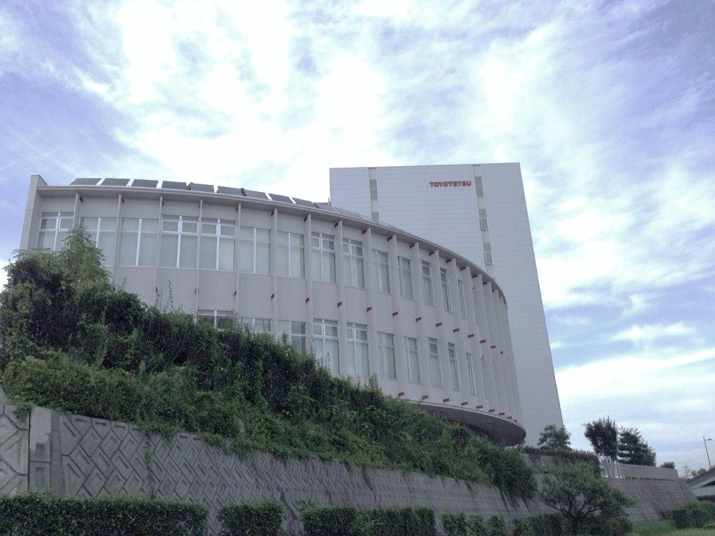 豊田鉄工本社